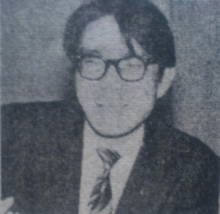 七味十〇四と名のった時代の鏡勘平|鏡勘平（1928年7月15日 - 1978年）、当時31歳（1959年8月）。